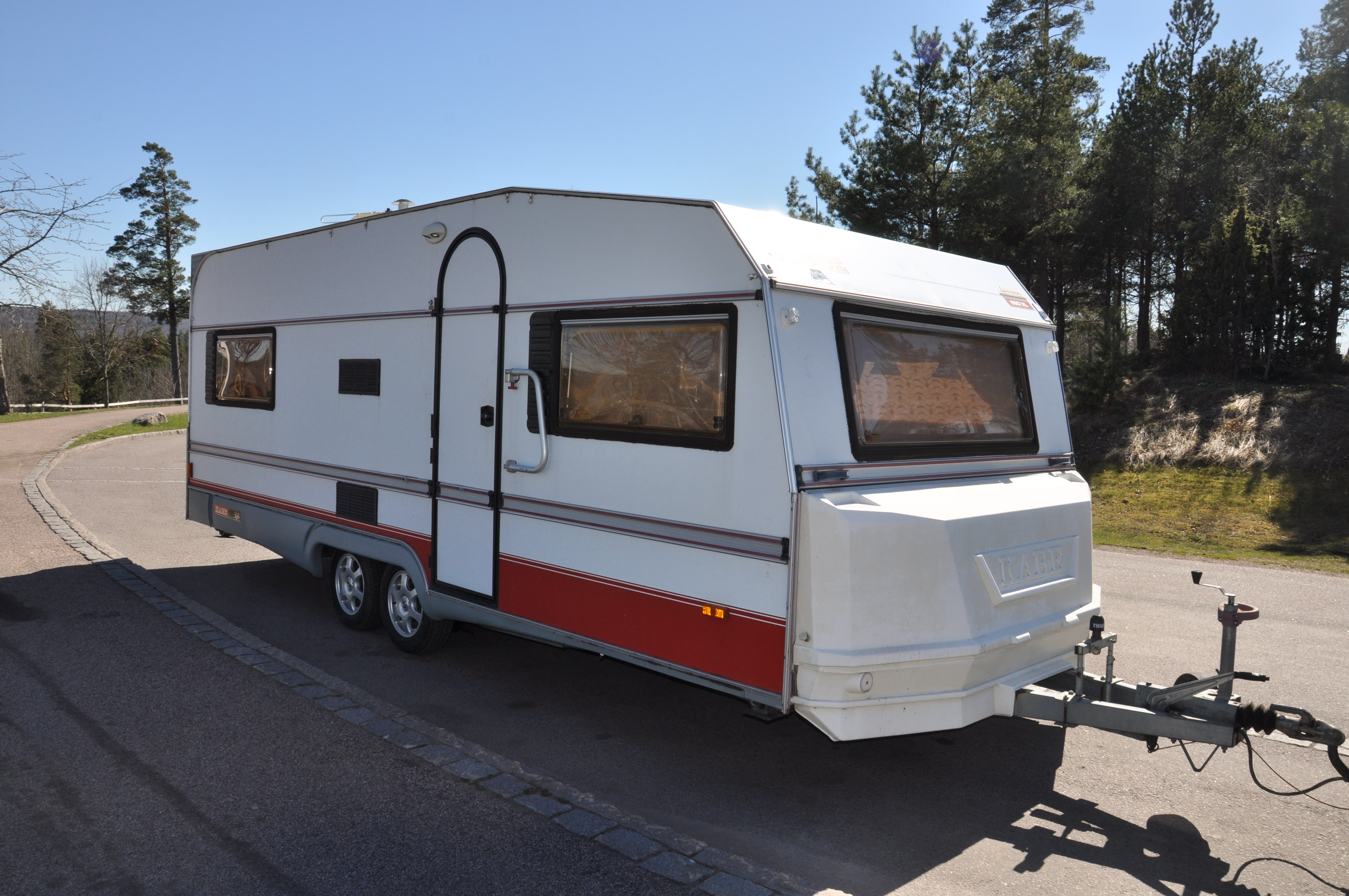 KABE husvagn.